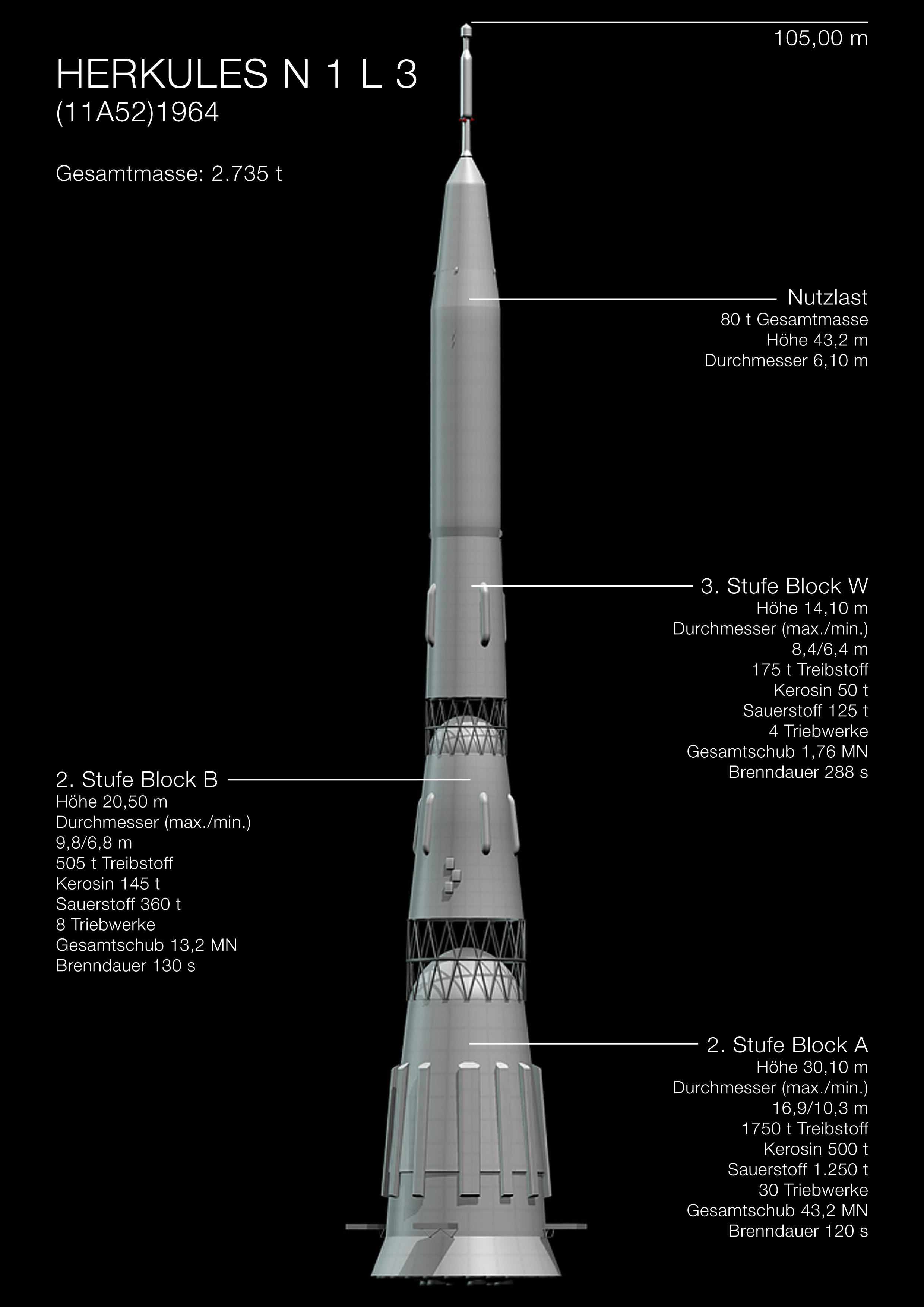 Darstellung der russischen Mondrakete N1 Herkules